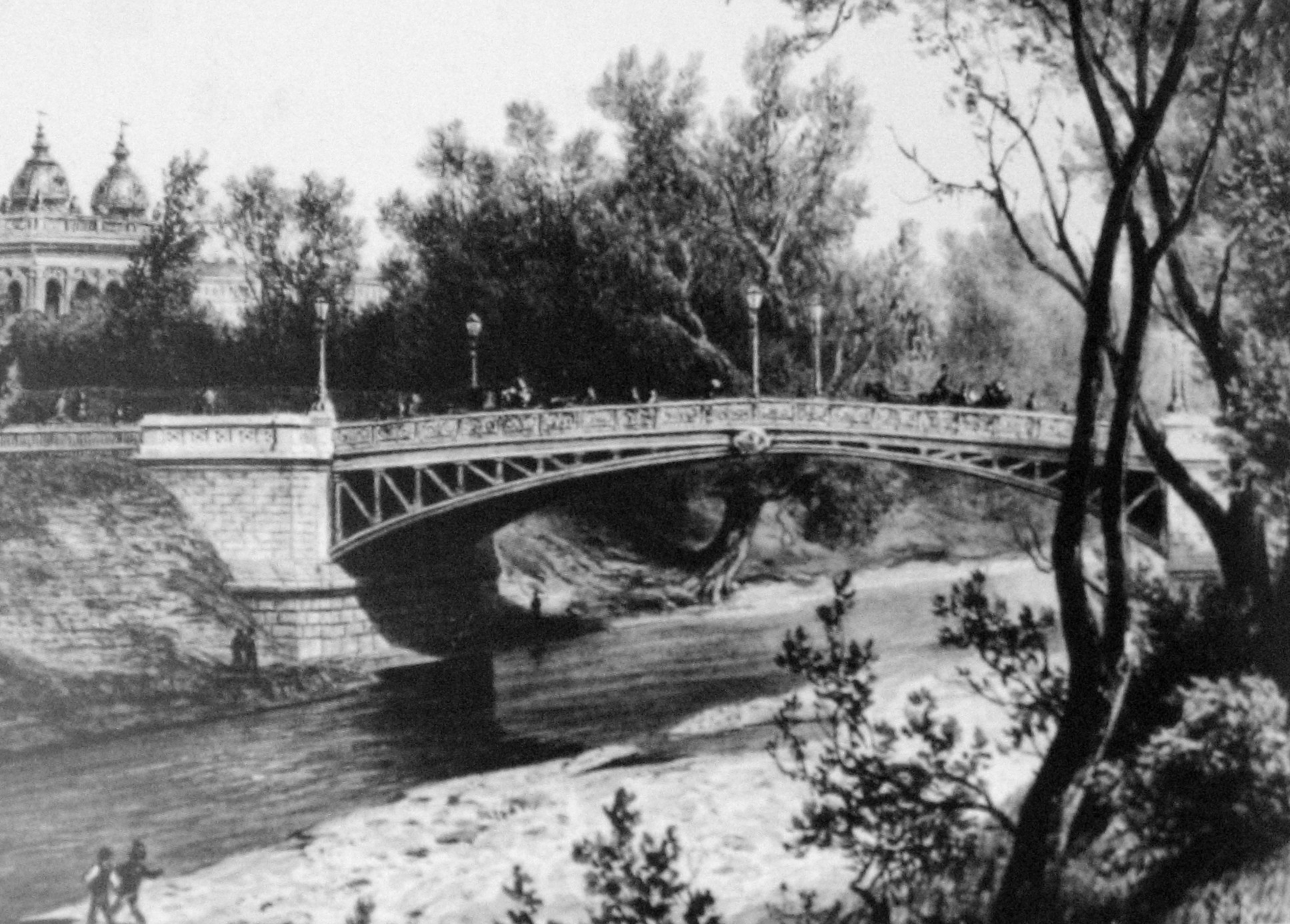 Wien, Tegetthoffbrücke im Jahre 1888title QS:P1476,de:"Wien, Tegetthoffbrücke im Jahre 1888" label QS:Lde,"Wien, Tegetthoffbrücke im Jahre 1888"